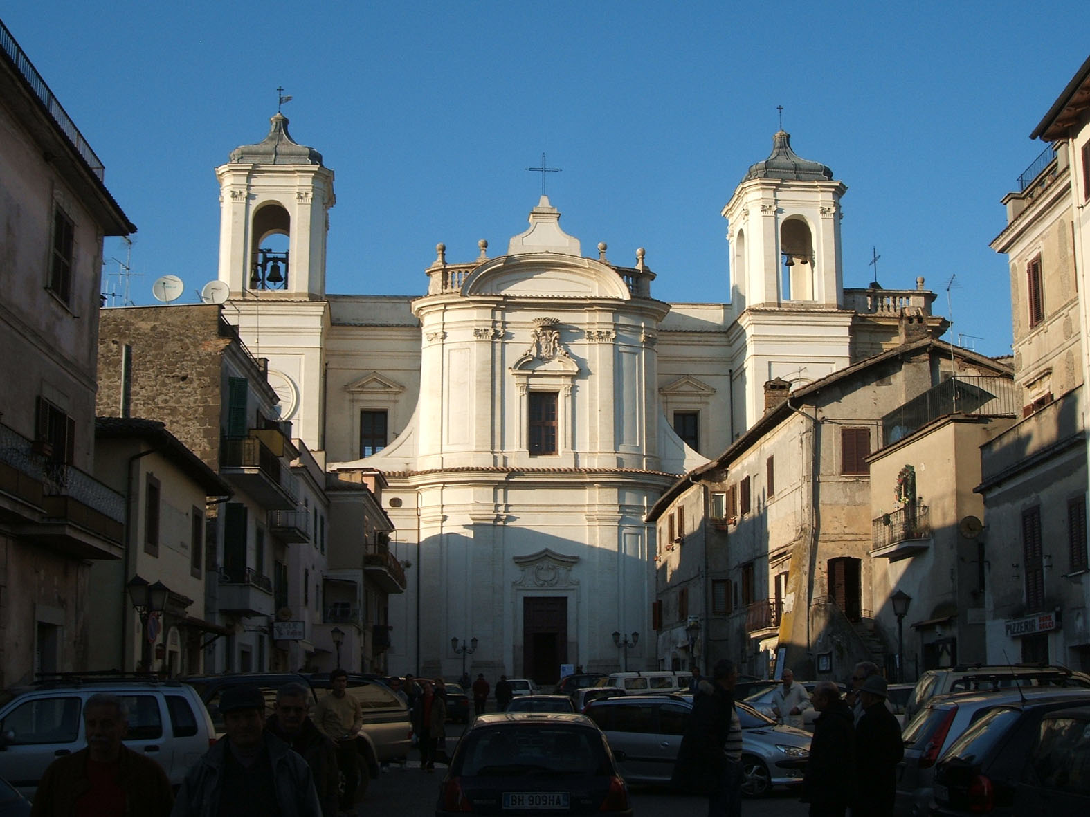 Vicovaro RM, Chiesa San Pietro